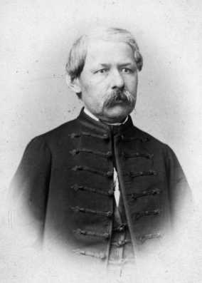 Arany János. Schrecker Ignác felvétele